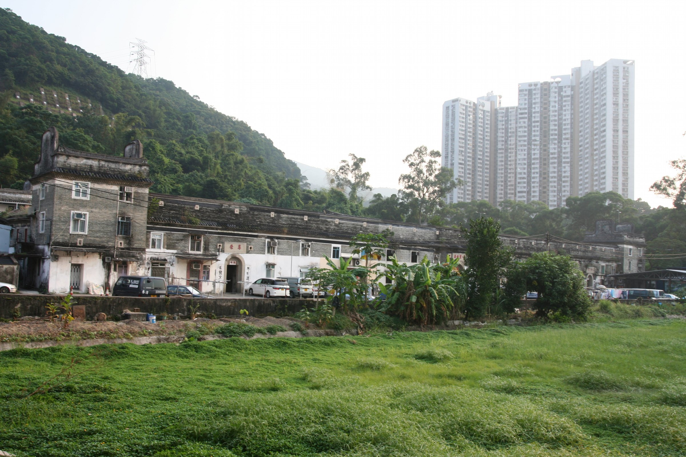 香港的圍村多設在新界, 例如 Tsang Tai Uk (曾大屋) 山下圍. Photograph author is me.